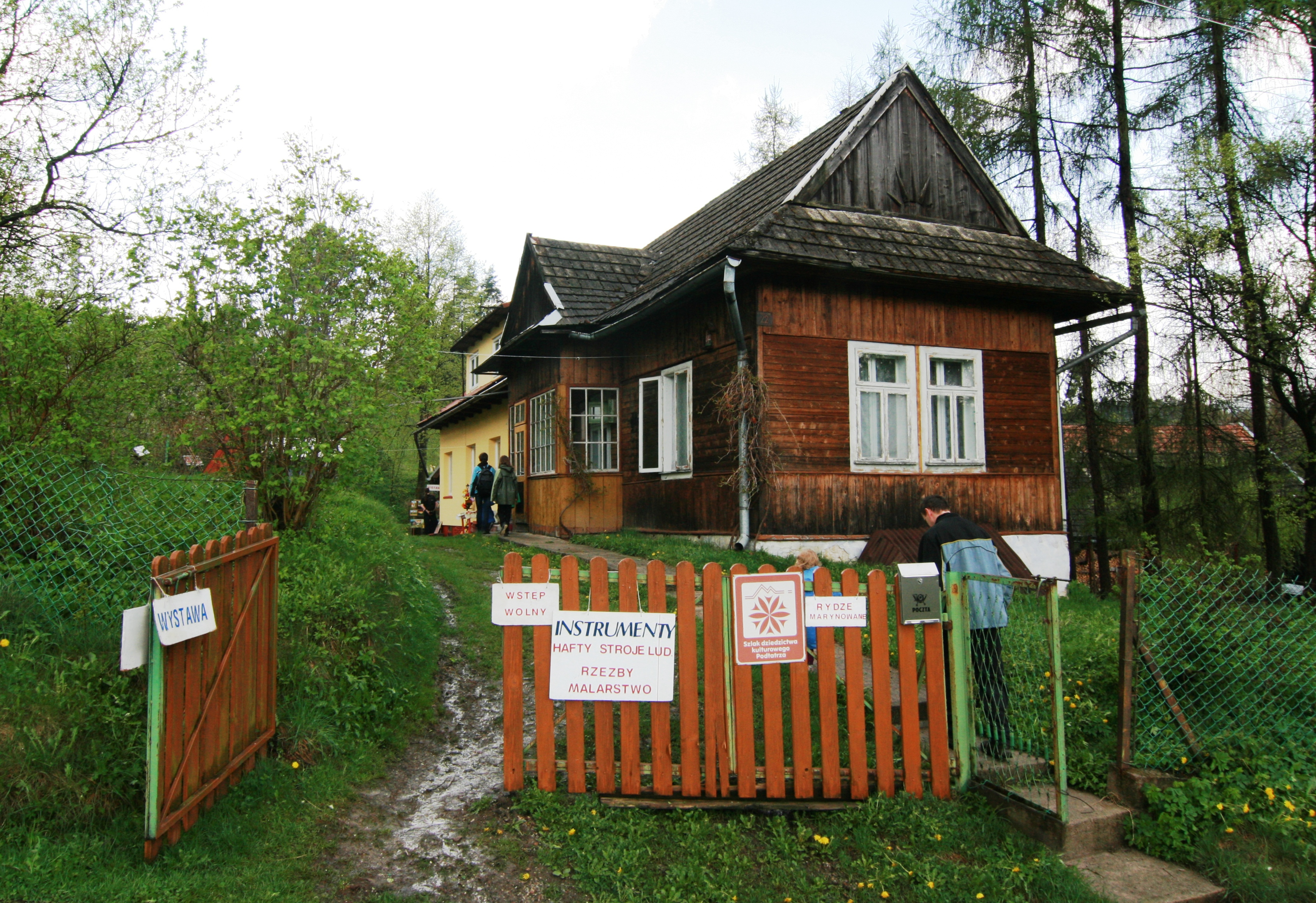 Muzeum Stanisława i Marii Czepielów w Krościenku nad Dunajcem - widok z zewnątrz